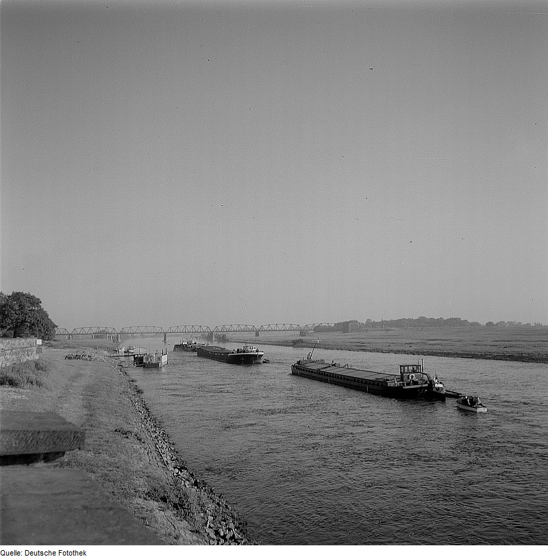 Original image description from the Deutsche Fotothek Meißen. Lastschiffe auf der Elbe, im Hintergrund die EisenbahnbrückeAlte Eisenbahnbrücke Torgau Quelle